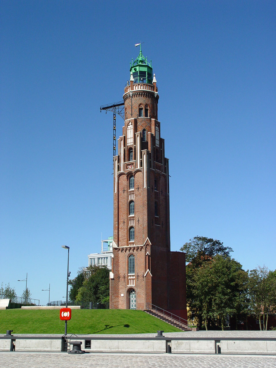 Leuchtturm Bremerhaven – Großer Leuchtturm („Loschenturm“) in Bremerhaven, Deutschland. Inbetriebnahme 1856. Erbaut von 1853–1855 von dem Bremer Architekten Simon Loschen im Stil der norddeutschen Backsteingotik. Der Turm ist 39,90 m hoch und noch heute als „Bremerhaven Oberfeuer“ in Betrieb. Foto: Jürgen Howaldt, eigene Aufnahme September 2005.